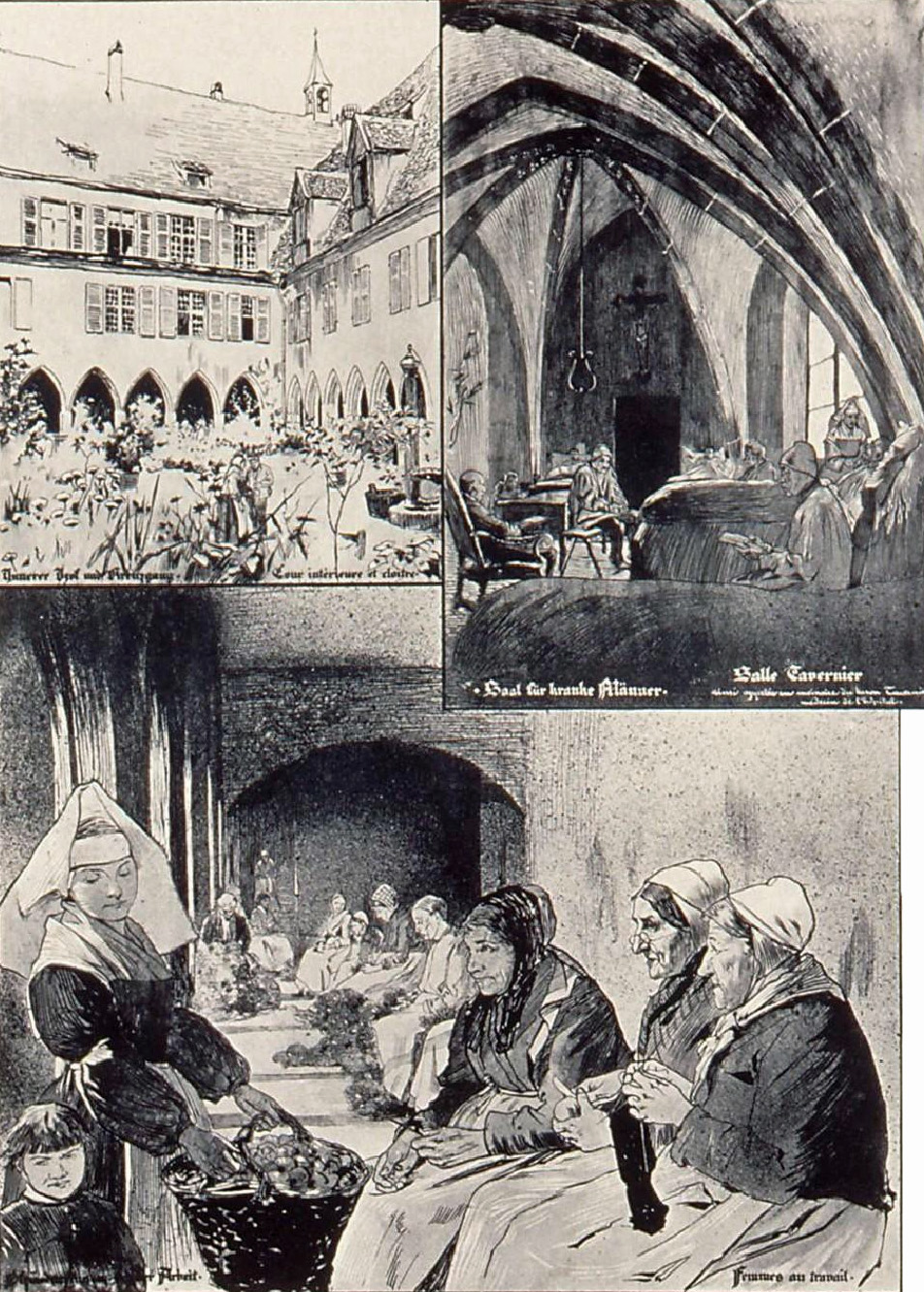 Buergerspital zu Schlettstadt = Hôpital de Sélestat. Bibliothèque nationale et universitaire de Strasbourg